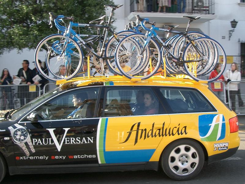 Andalucia Team Car